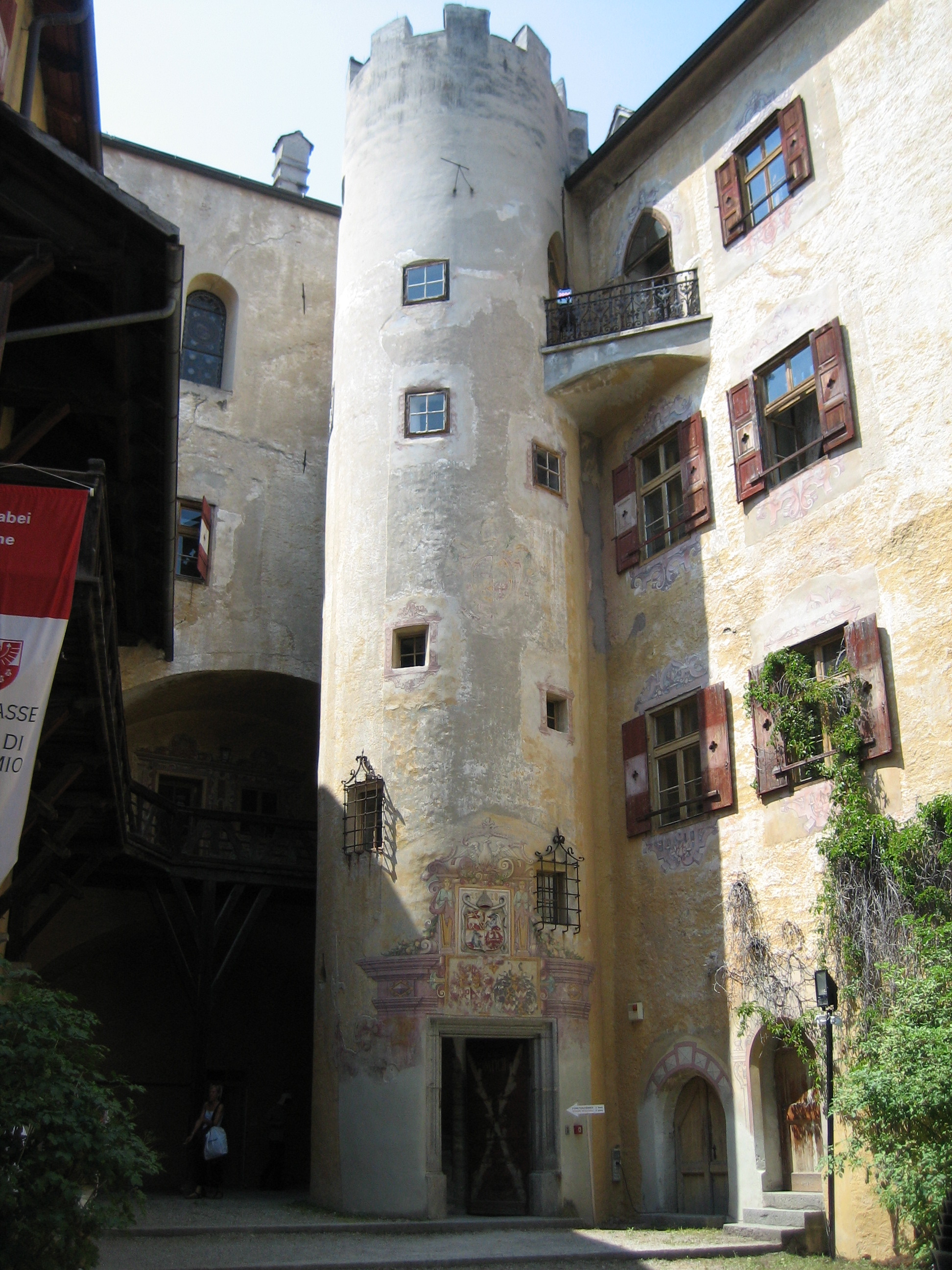 Schloss Bruneck: Turm im Innenhof